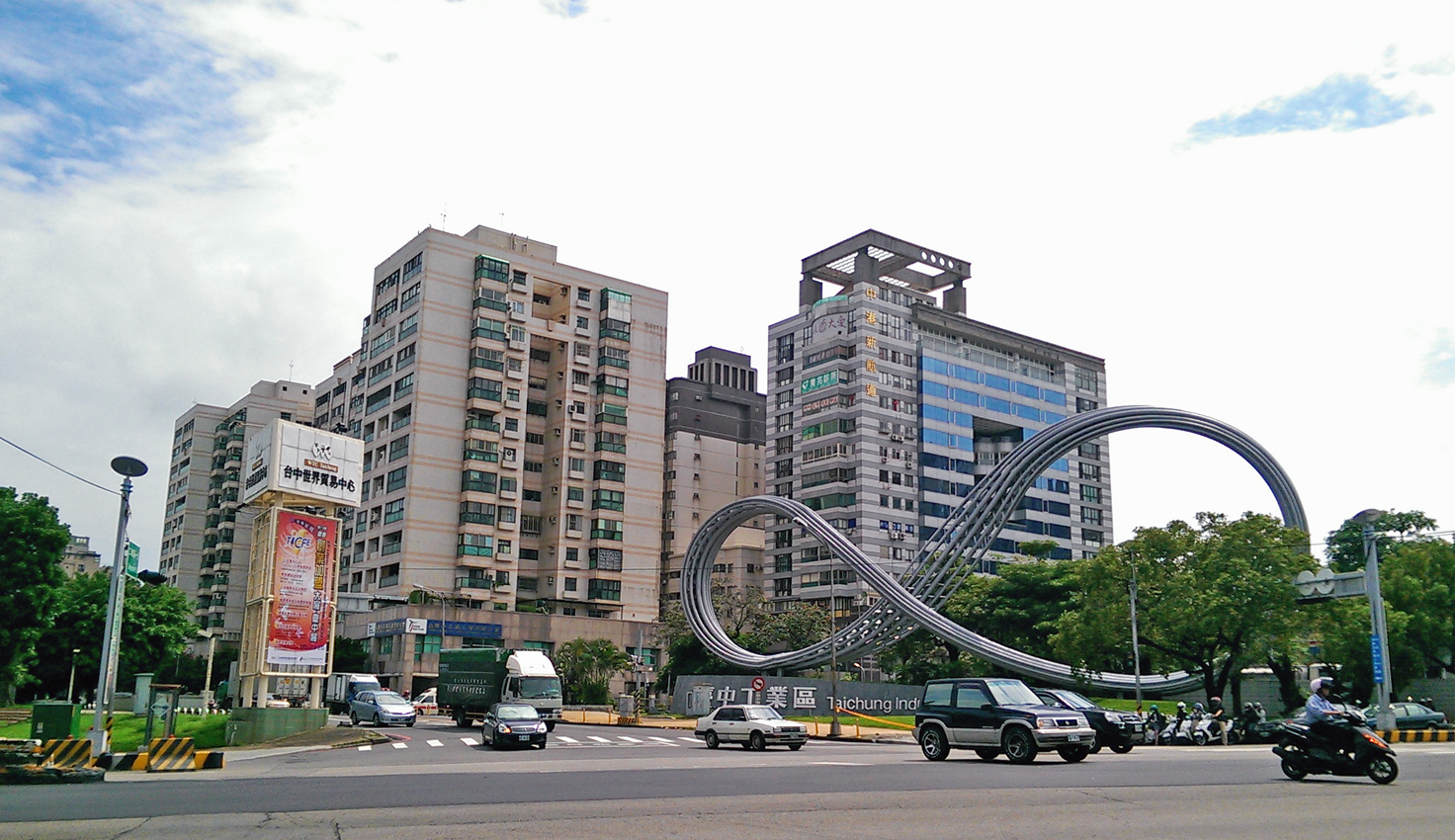 中文（台灣）: 臺中市西屯區臺灣大道四段，臺中工業區入口意象（右）與台中世界貿易中心標誌鐵架（左）。